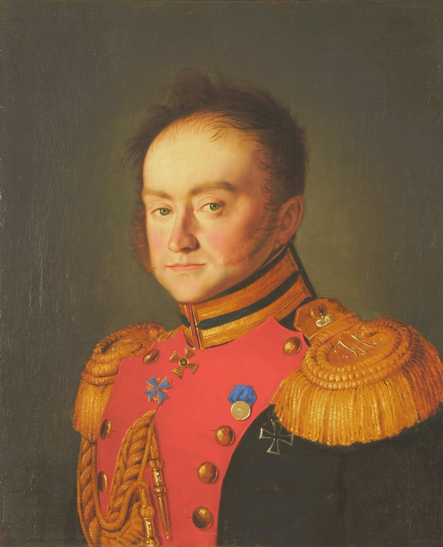 Стюрлер Николай Карлович (Николаус Людвиг), швейцарец, родился около 1783 года в Берне. В 1811 году швейцарский подданный Лагарп, бывший воспитатель великого князя Александра Павловича, прислал его в Россию и письменно просил у своего воспитанника императора Александра I покровительствовать своему земляку, в результате чего Стюрлер был определен поручиком в лейб-гвардии Семёновский полк. В 1814 году он был произведен в капитаны, а примерно через пять лет — в полковники. Новосибирский художественный музей